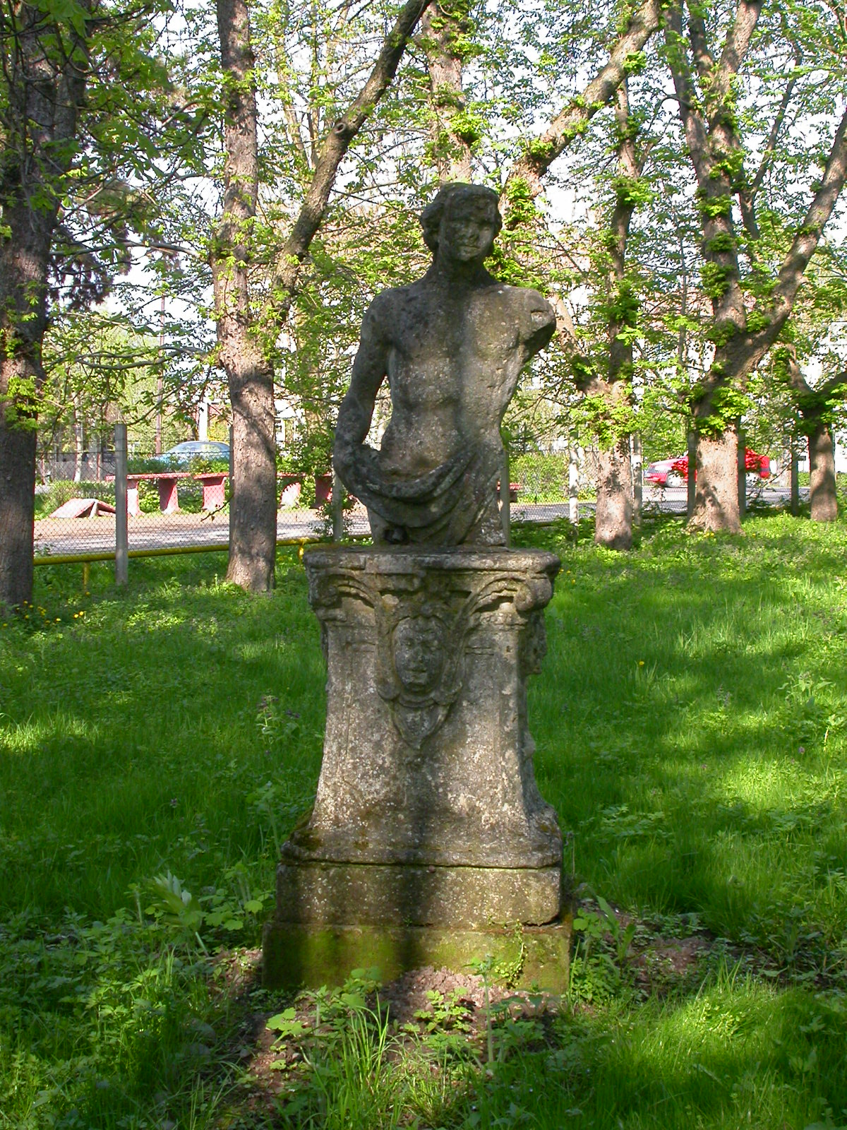 Ansamblul castelului Teleki, sec. XVIII - XIX